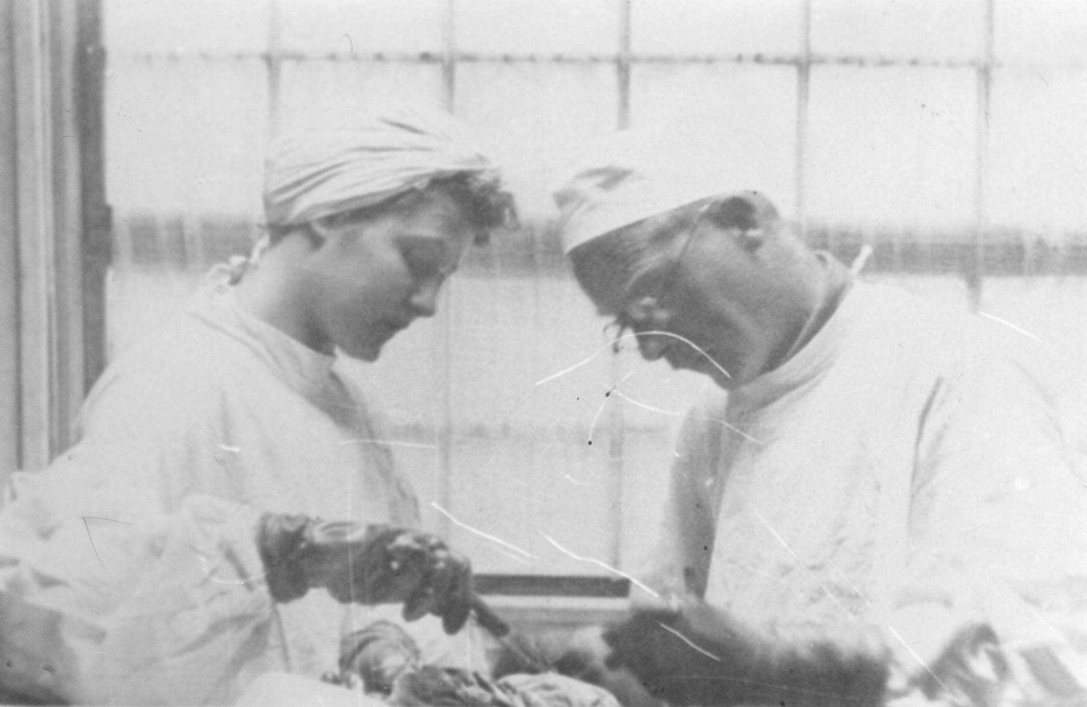 Bogdan Brecelj v kirurški ambulanti partizanske bolnišnice Hrastnik